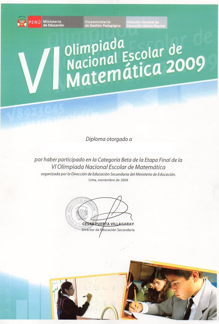 Típica diploma otorgada en la final de la ONEM 2009 (cuarta fase).